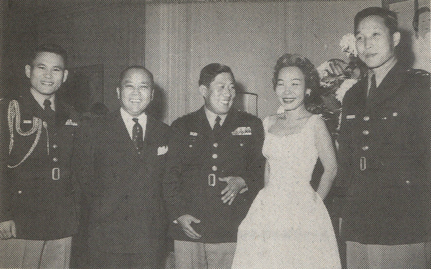 왼쪽부터 주미대사관 부무관(副武官) 이후락, 주미 대사 양유찬, 유재흥, 양유찬의 부인, 김형일(金炯一).